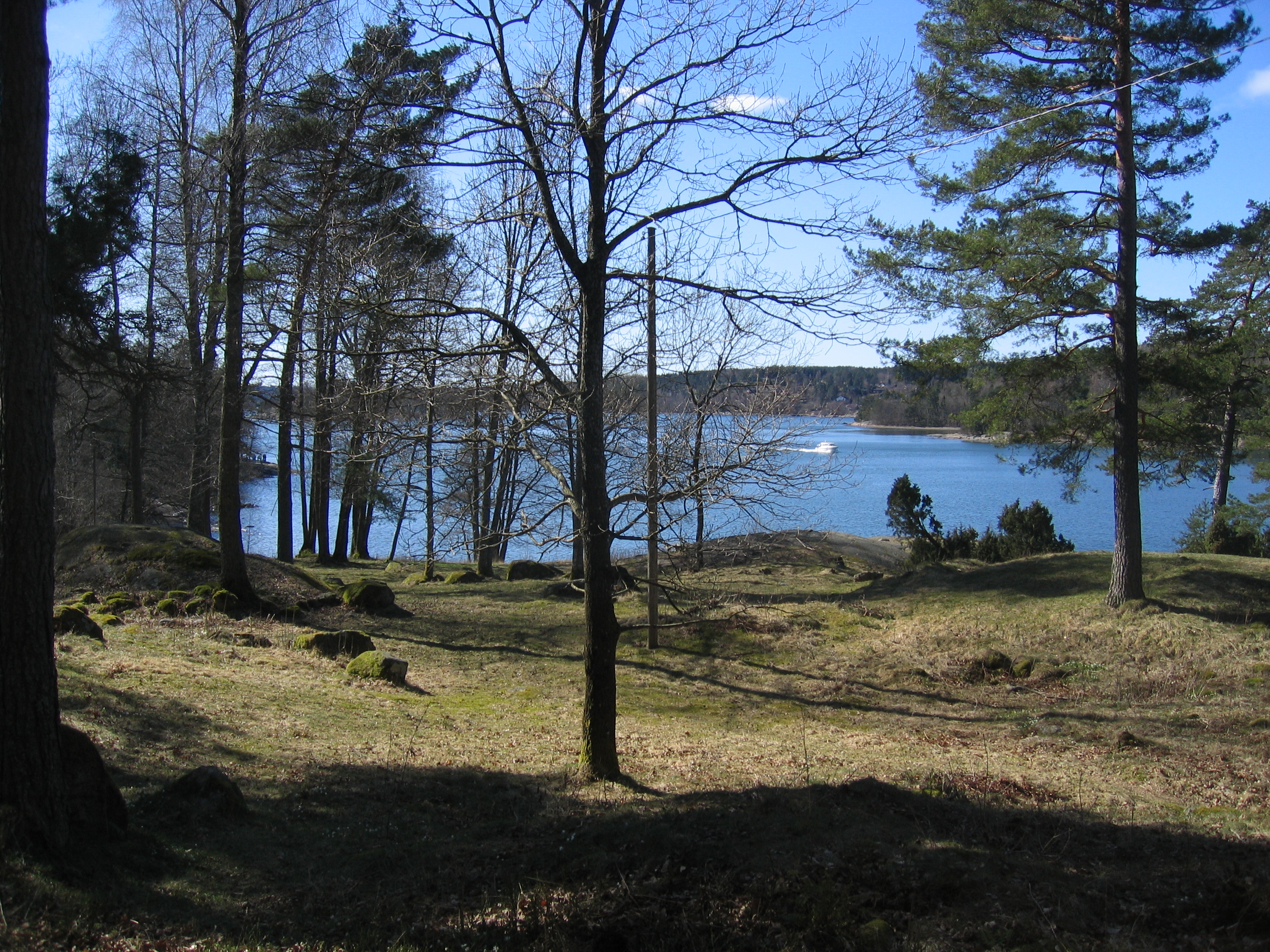 Gravhauger på Søndre Hella.